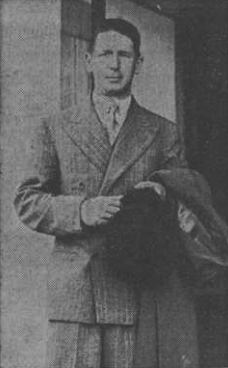 Kjell Westin